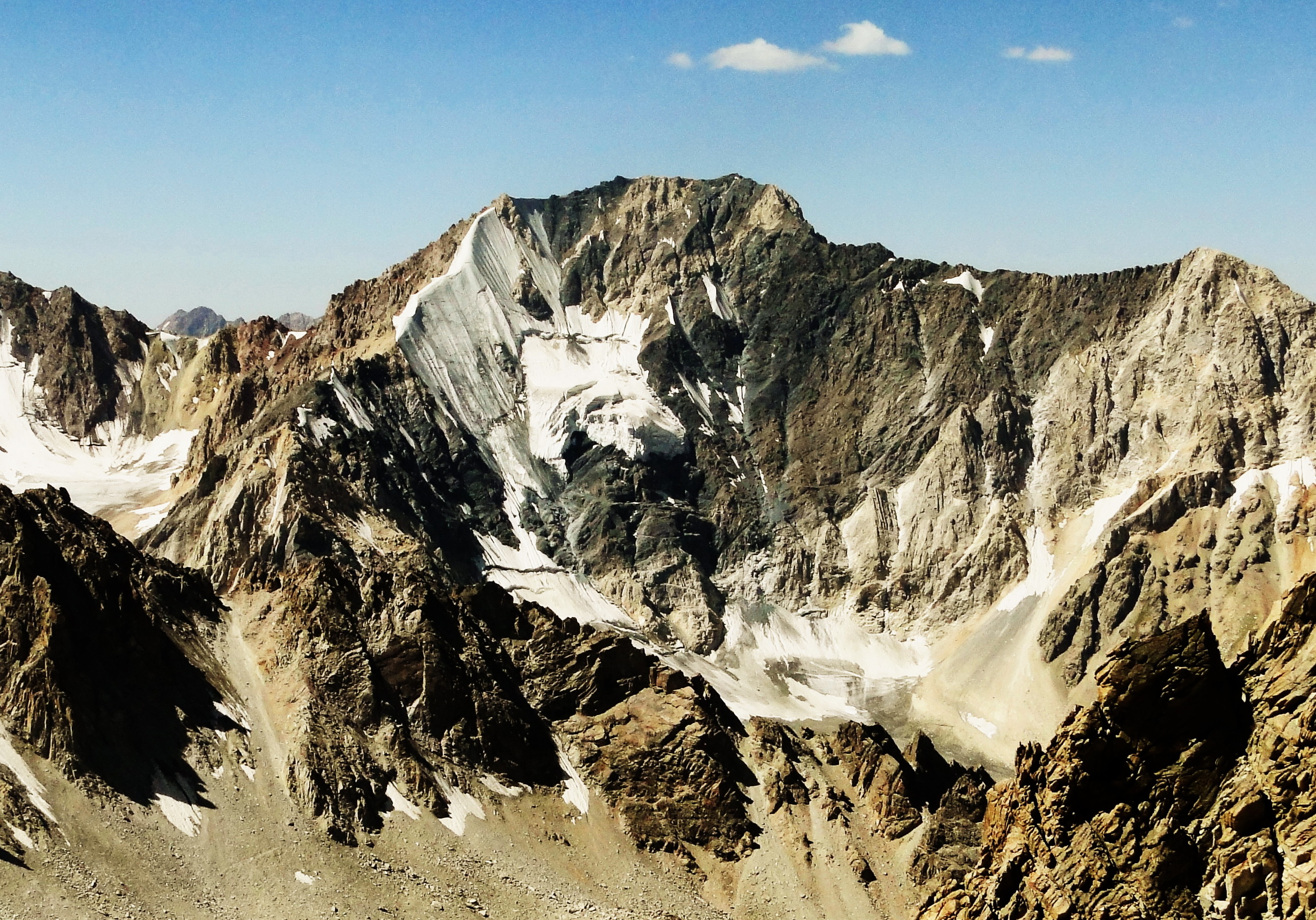 пик им. А.С. Аделунга, 4301, Пскемский хребет, Узбекистан